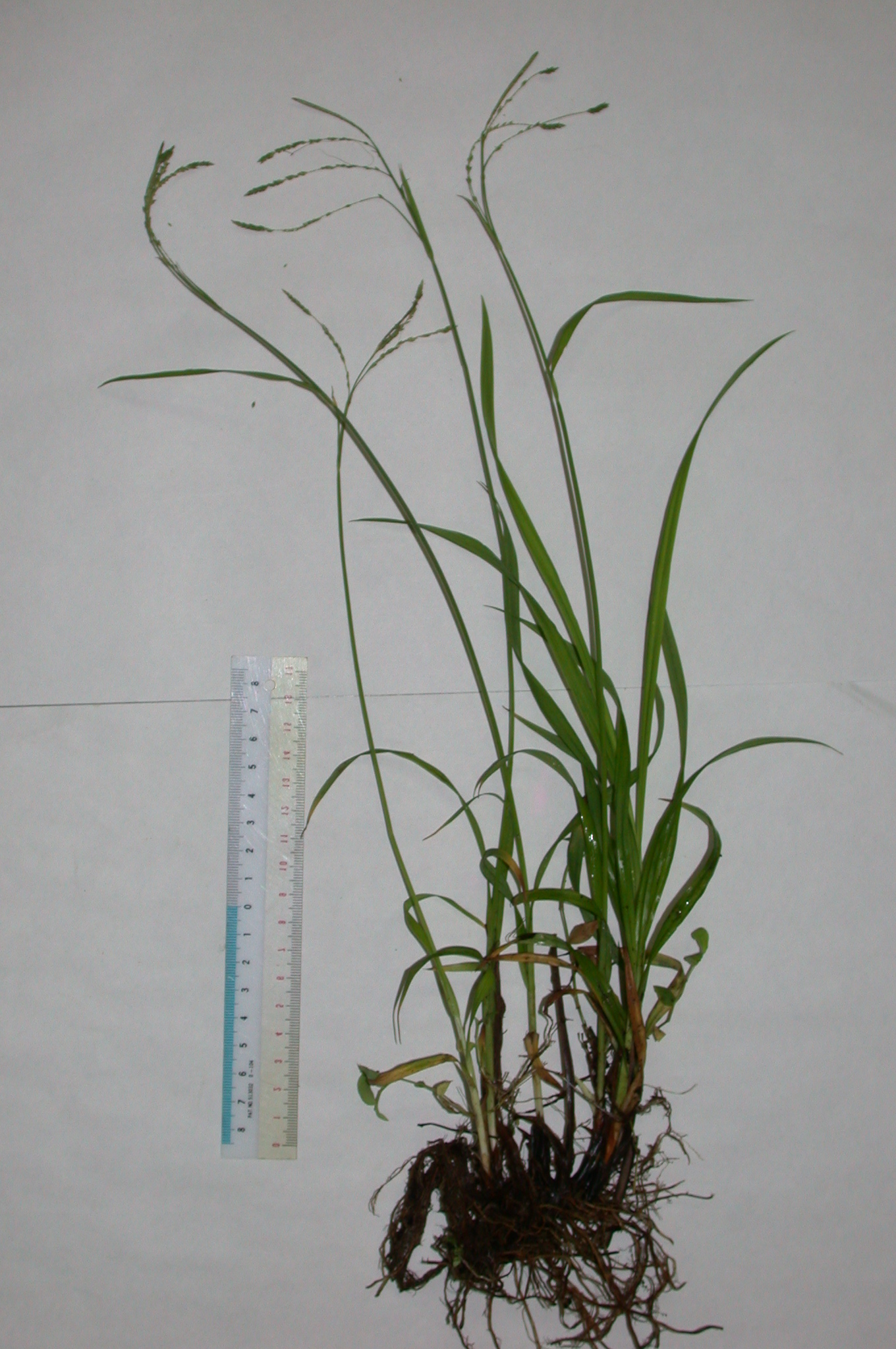 Carex incisa (Cyperaceae) カワラスゲ 和歌山県田辺市:Tanabe city,Wakayama pref. Japan 2004/06/